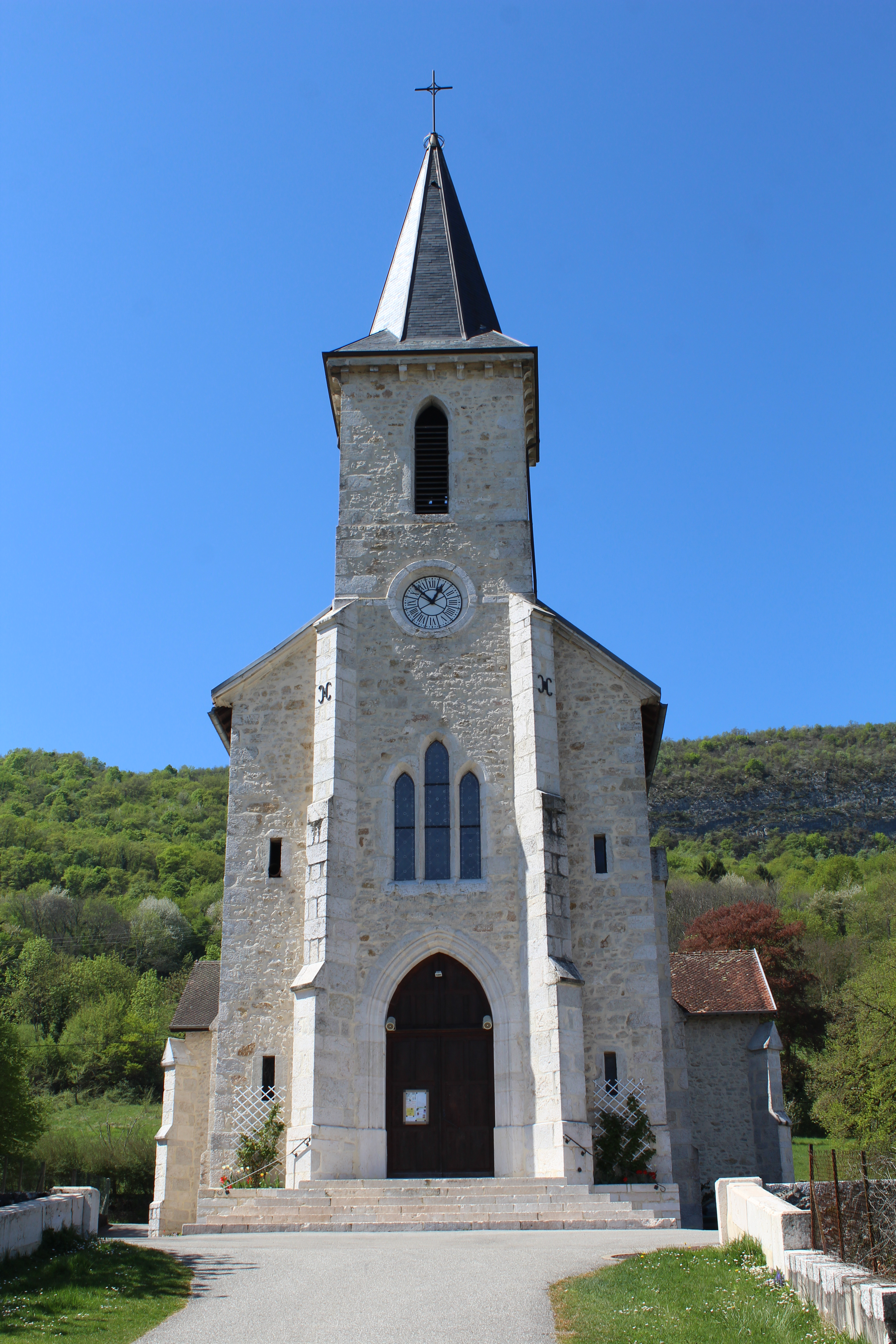 Église Saint-Martin de Peyrieu.